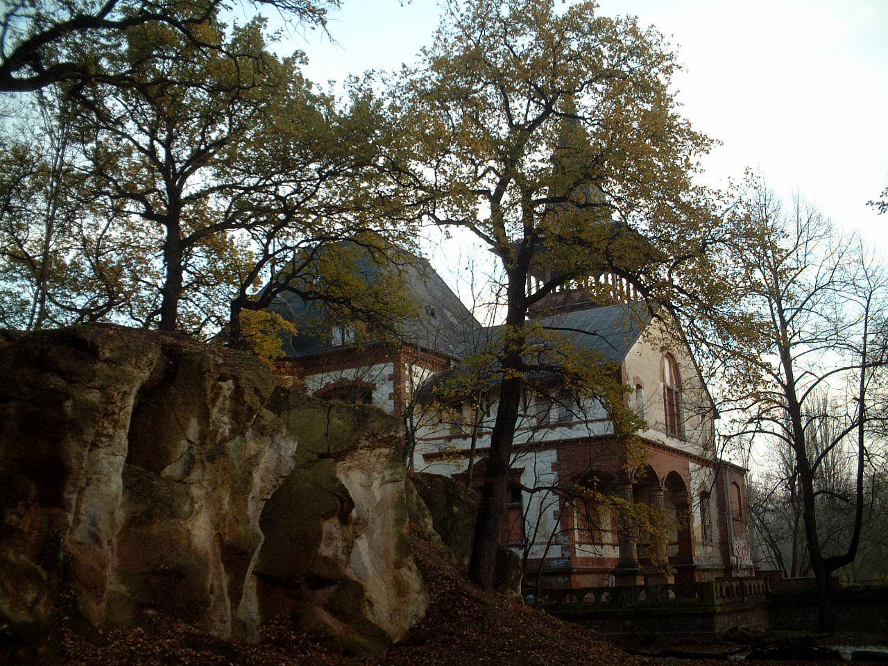 Peißnitzhaus im Herbst 2005, Westansicht